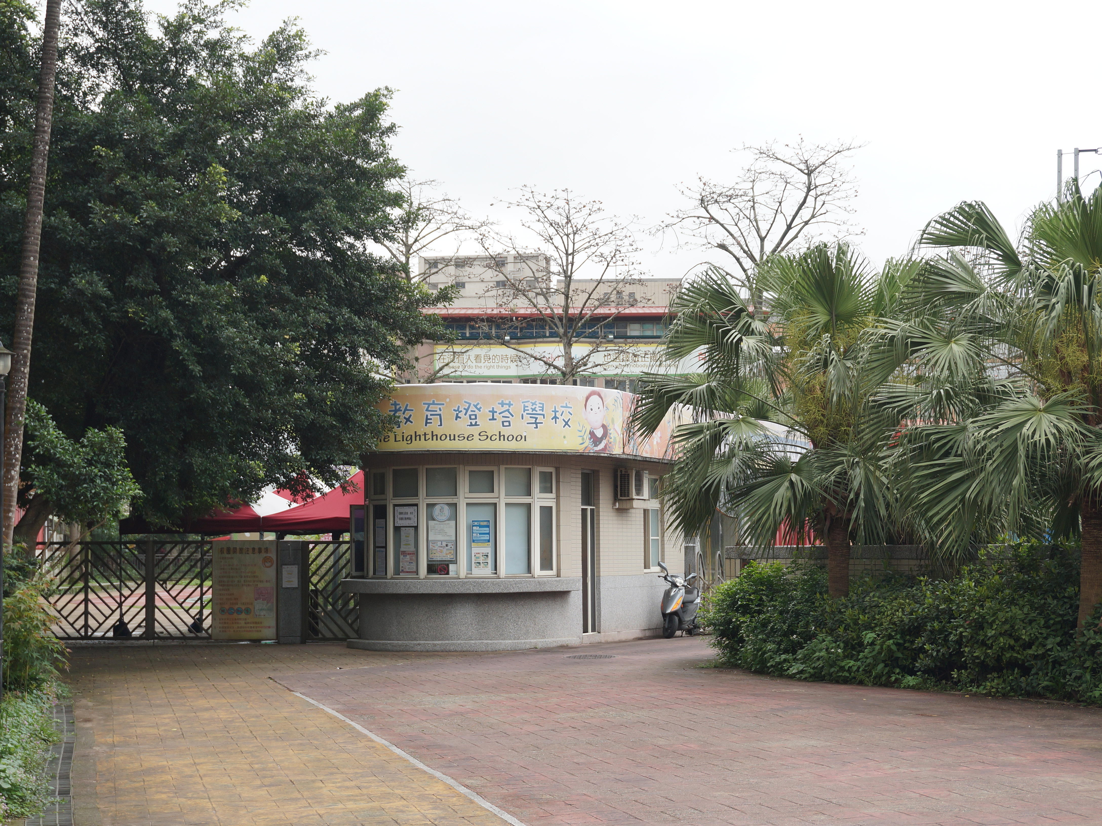 新北市汐止區保長國民小學大門。